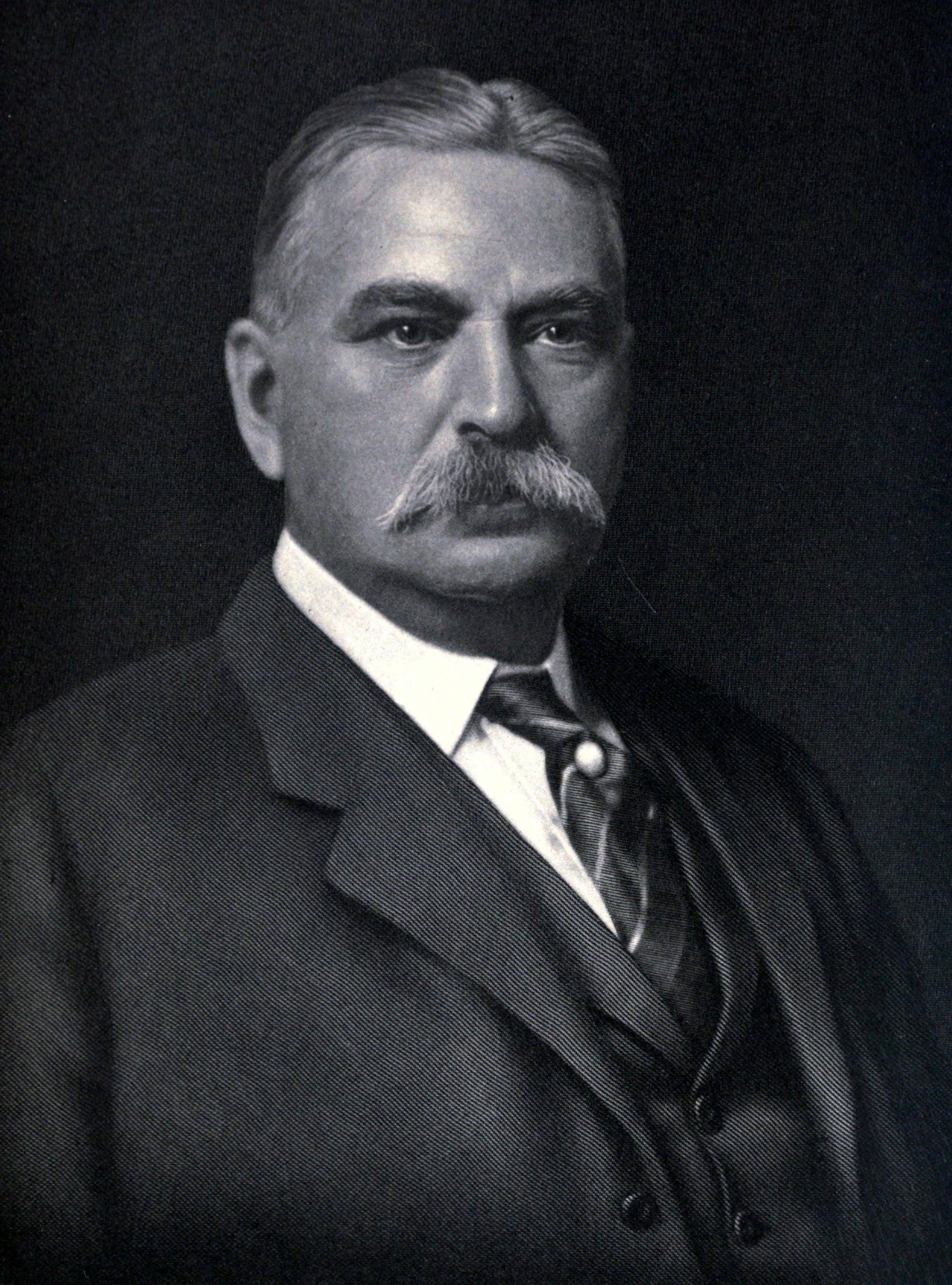 John Warne Gates